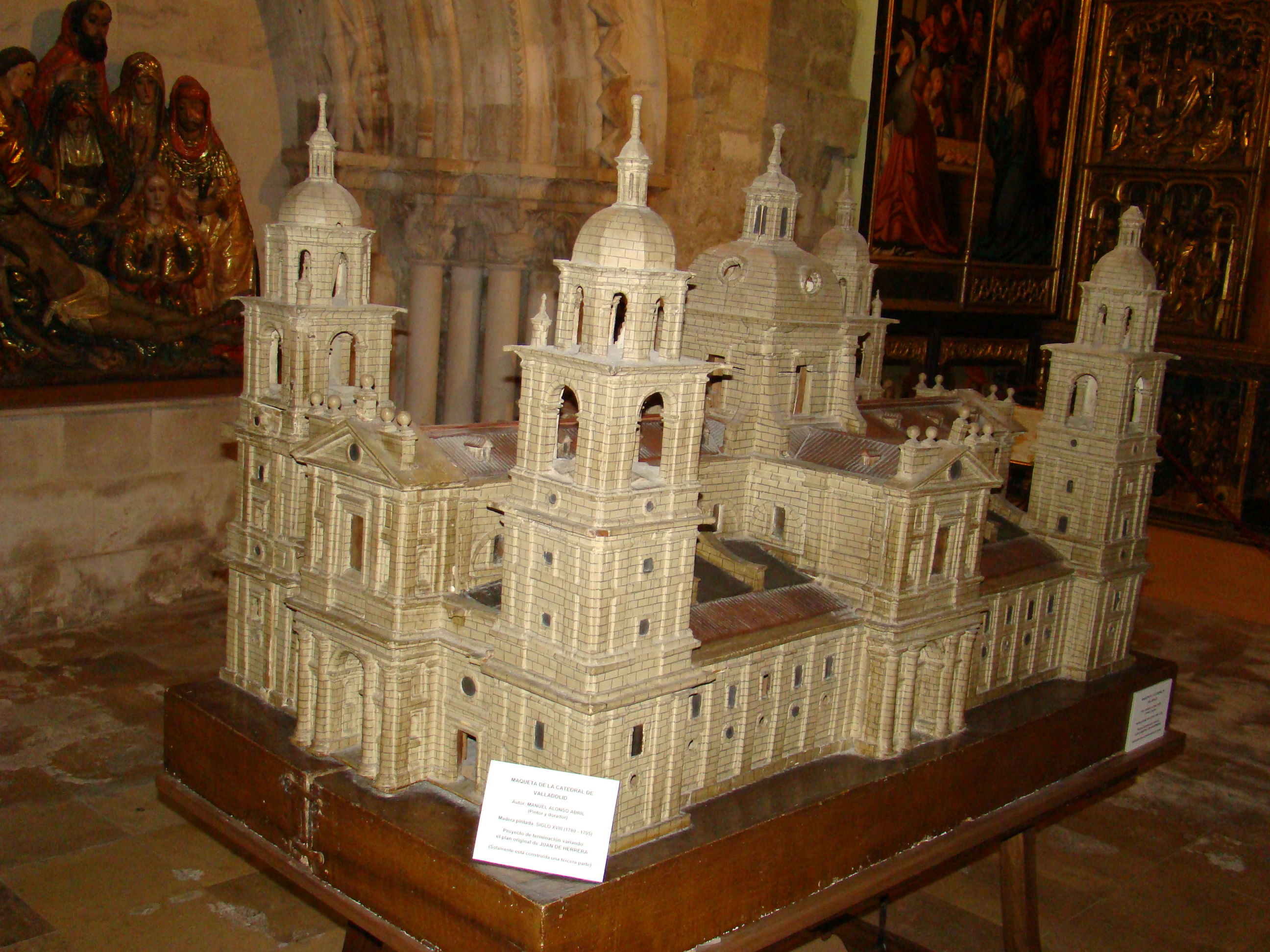 Museo catedralicio de Valladolid, rincón del claustro. Maqueta de la catedral de Valladolid, del siglo XVII de un proyecto que nunca se realizó.